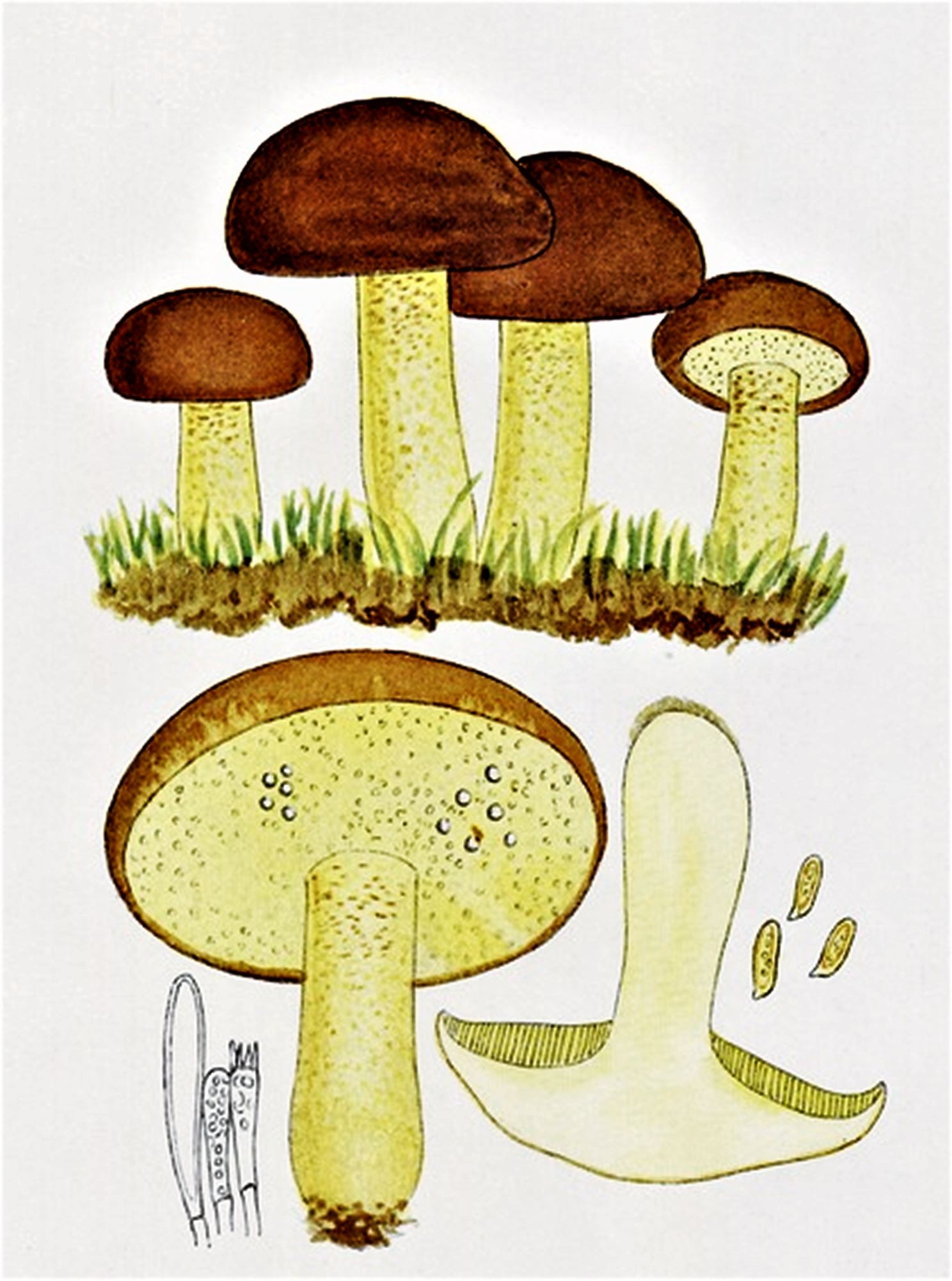 Giacomo Bresadola: Boletus granulatus ((L.), 1753 ex Fr. (1821), heute Suillus granulatus (L.) O.Kuntze (1898)